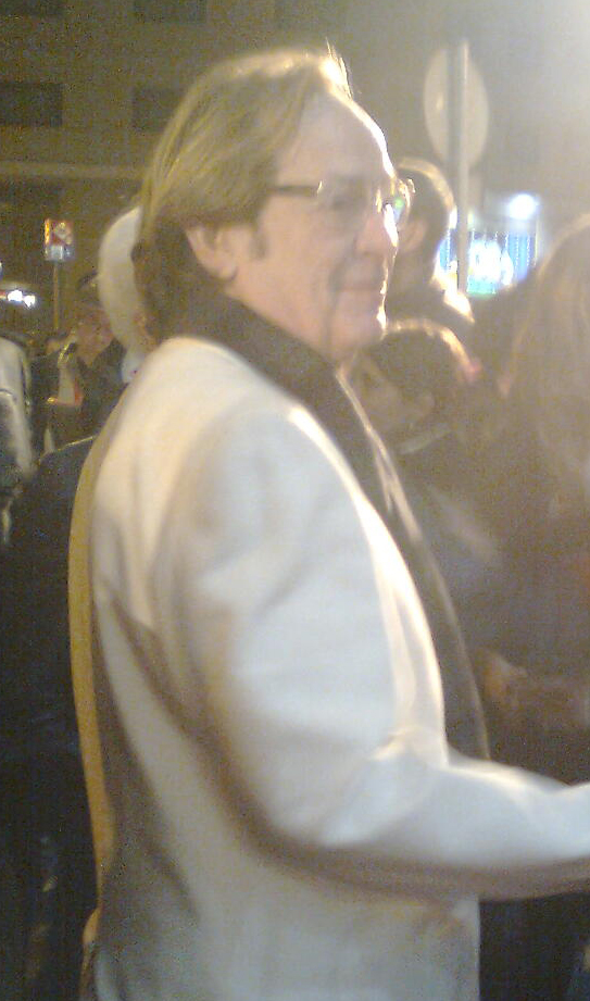 Ventura Pons als III Premis Gaudí